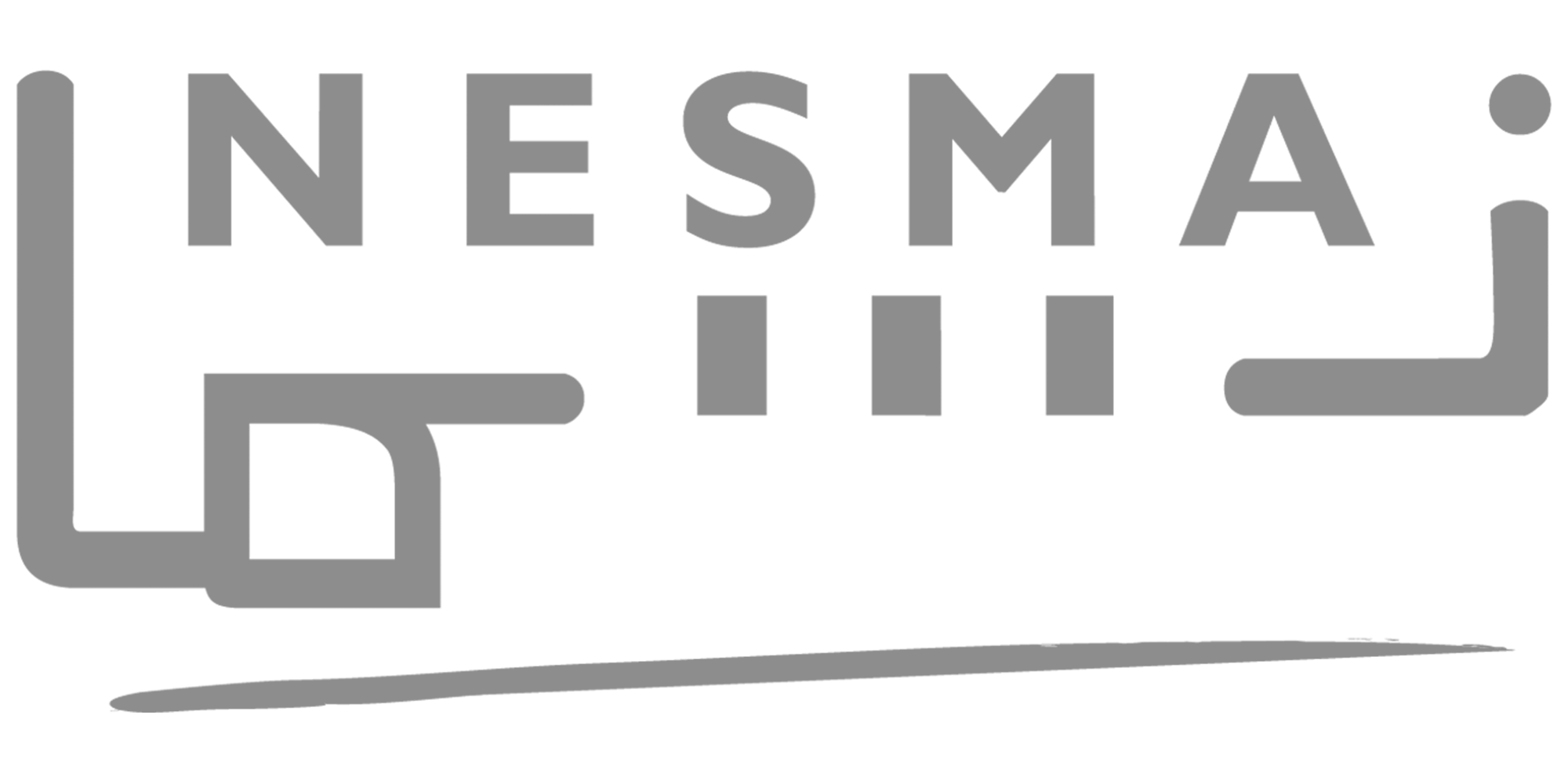 شعار شركة نسما القابضة